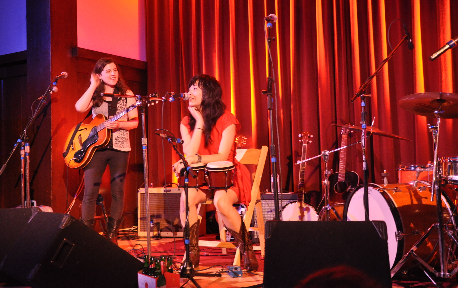 Mirah and Thao onstage bongos